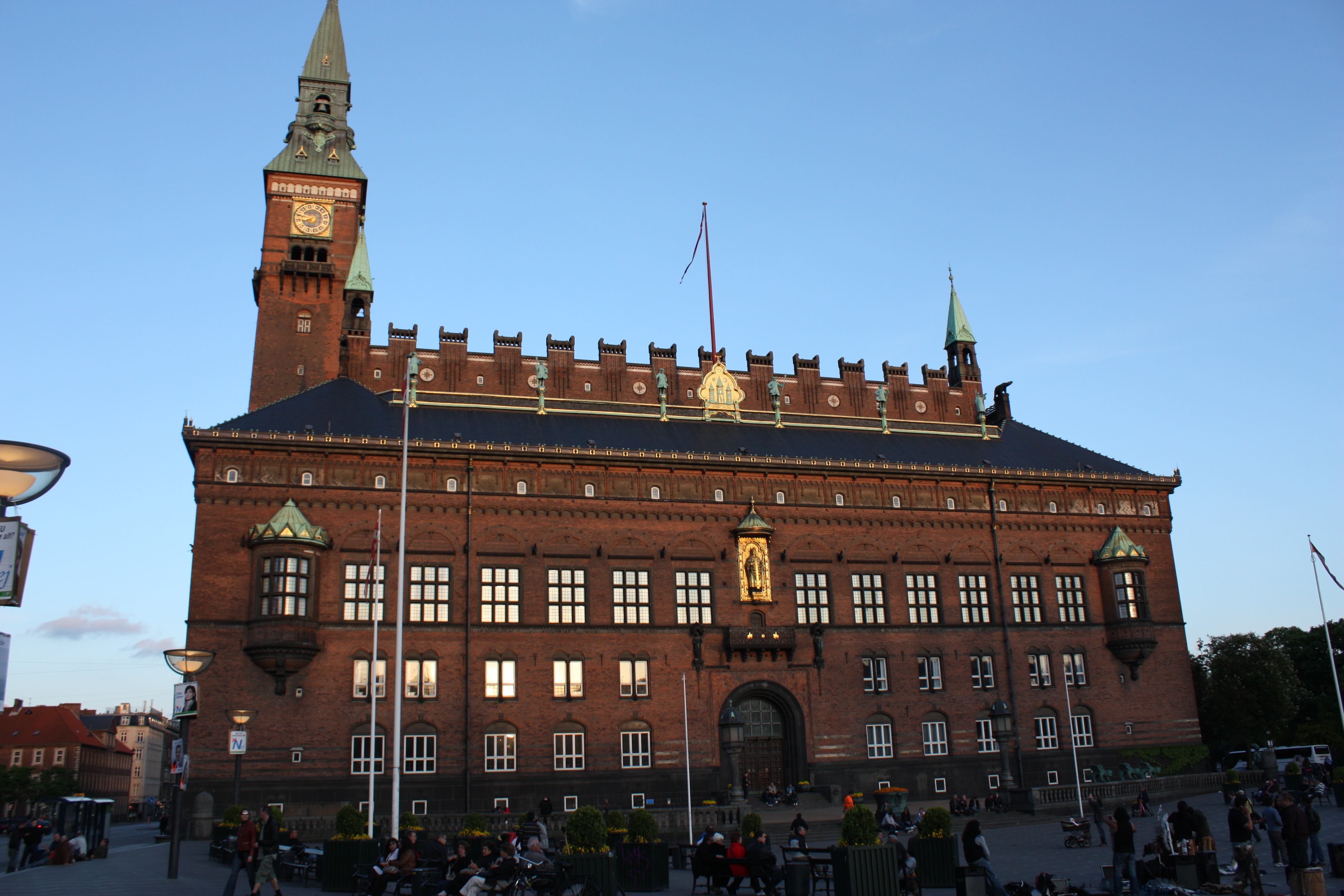 Kopenhagen 2009